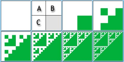 Sierpinskitriangel skapad med "xeroxmetoden", ett IFS.